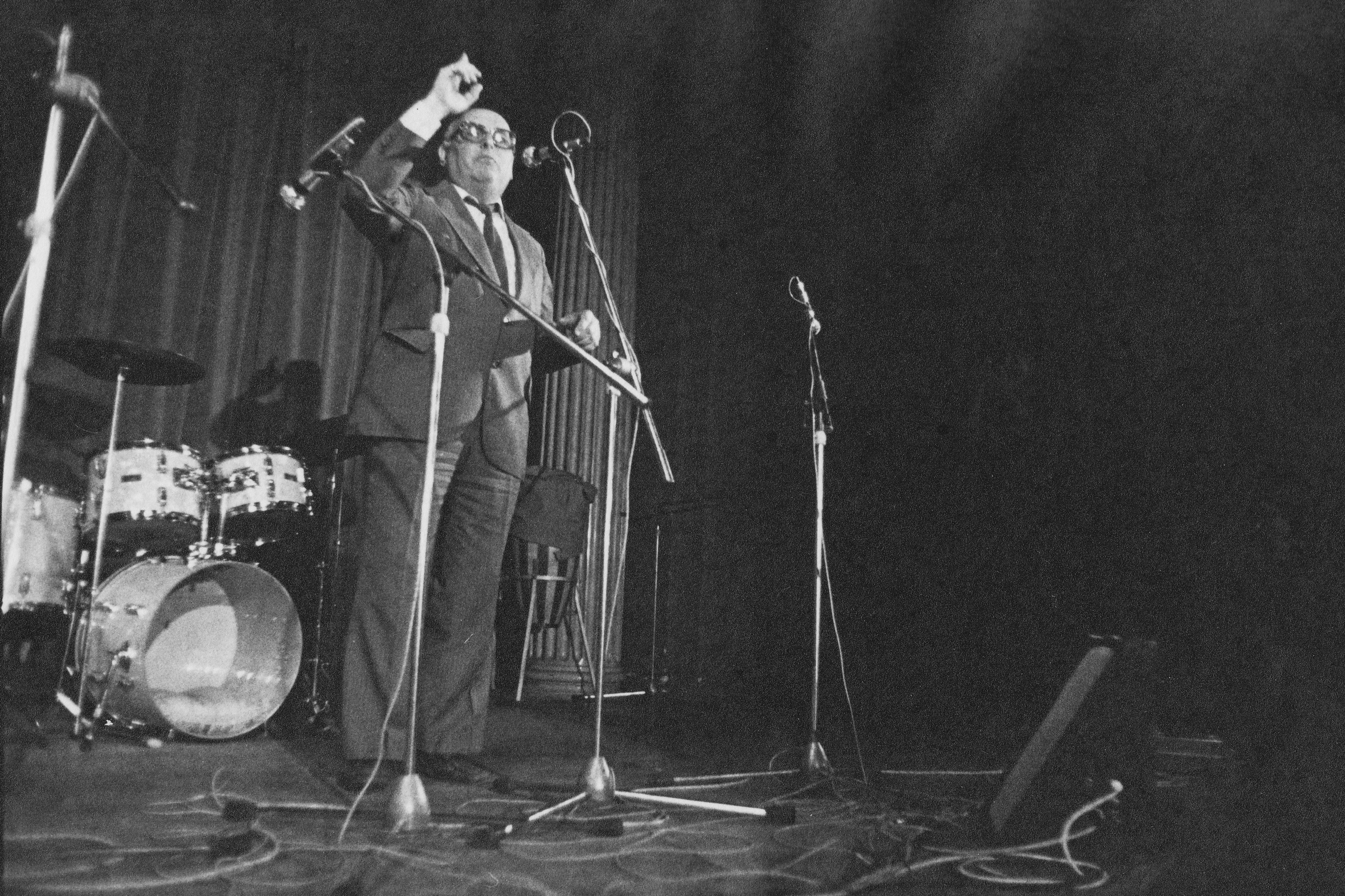 Jan Hammer starší, Ozvěny Vokalízy, Žofín, 22. červen 1982